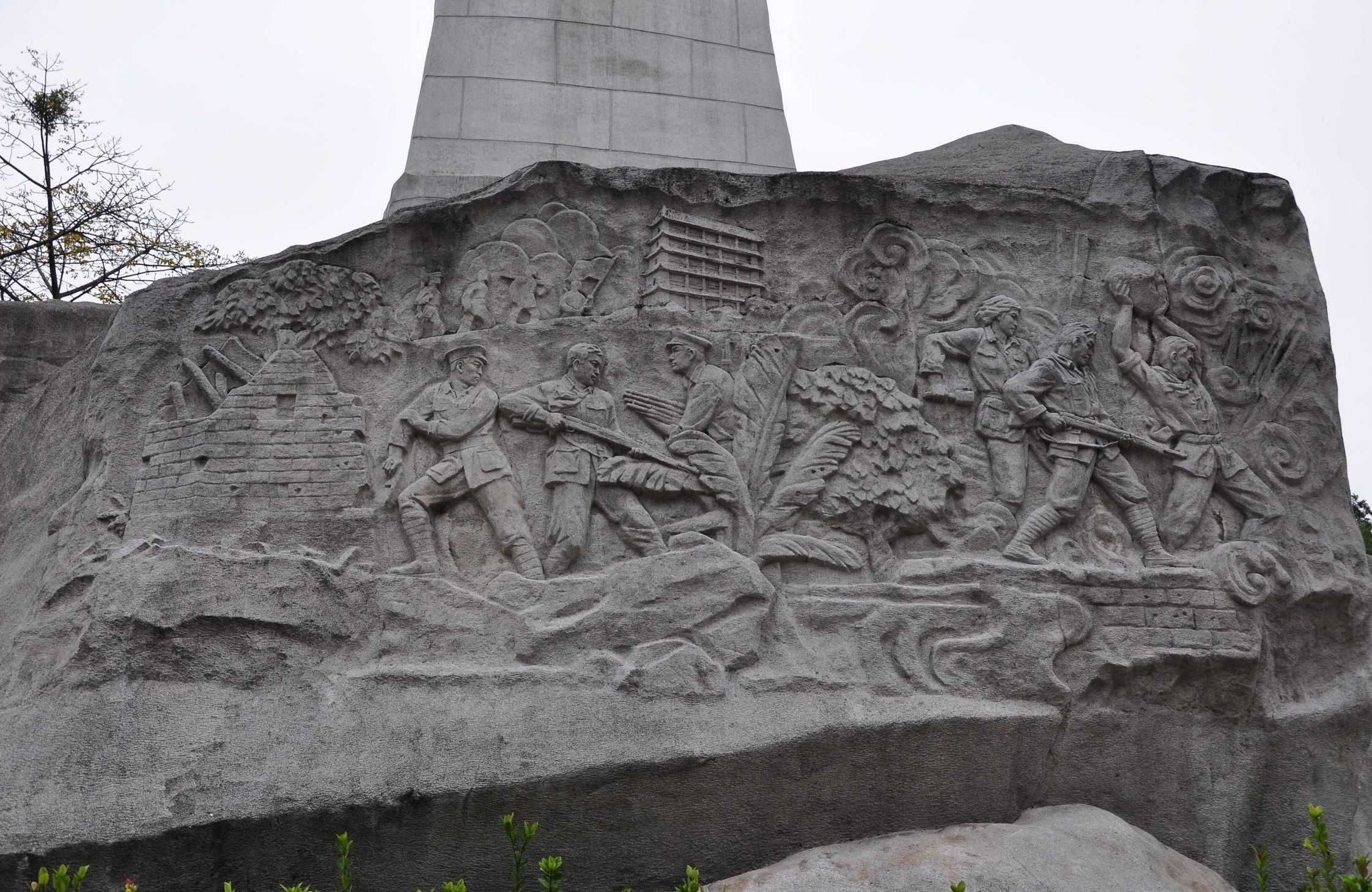 Památník